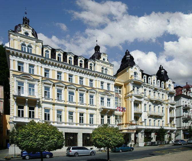 Hotel Excelsior, Mariánské Lázně